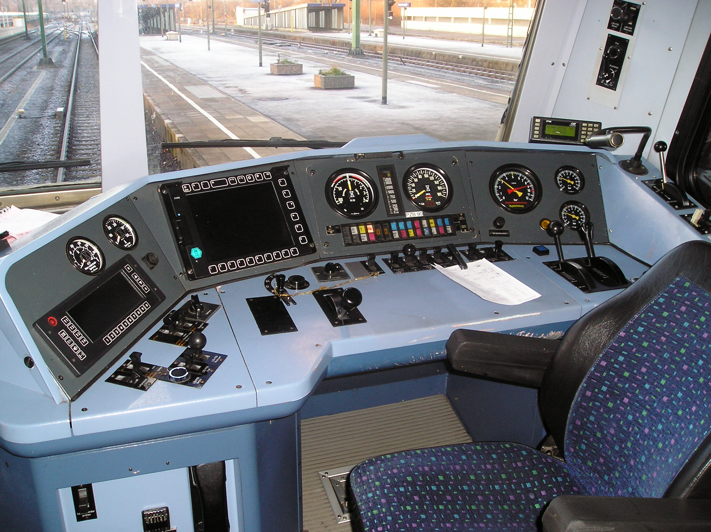 Führerstand des 50 80 80-34 152-3 mit LZB, Bauart 483.1